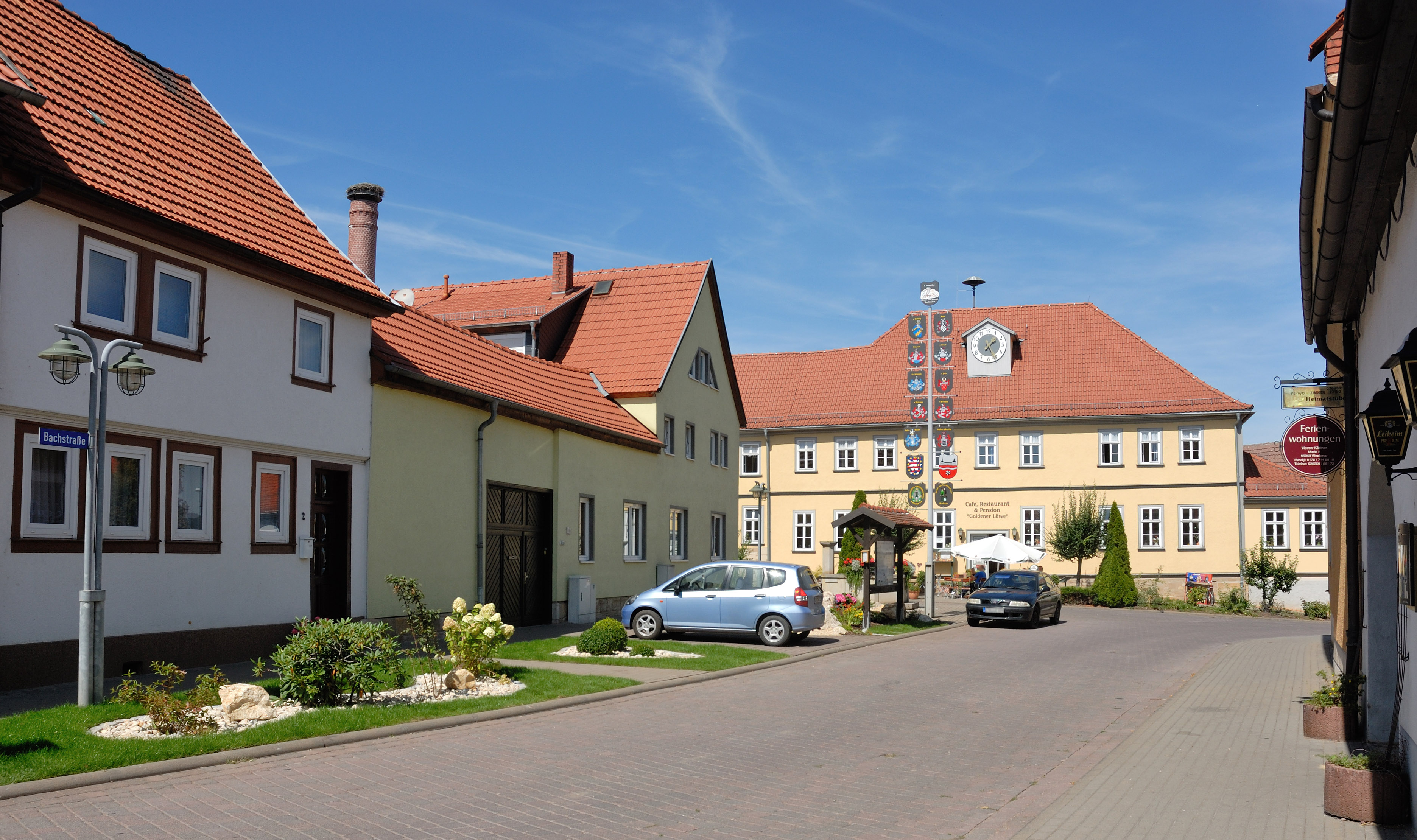 Bachstraße, im Hintergrund "Goldener Löwe"